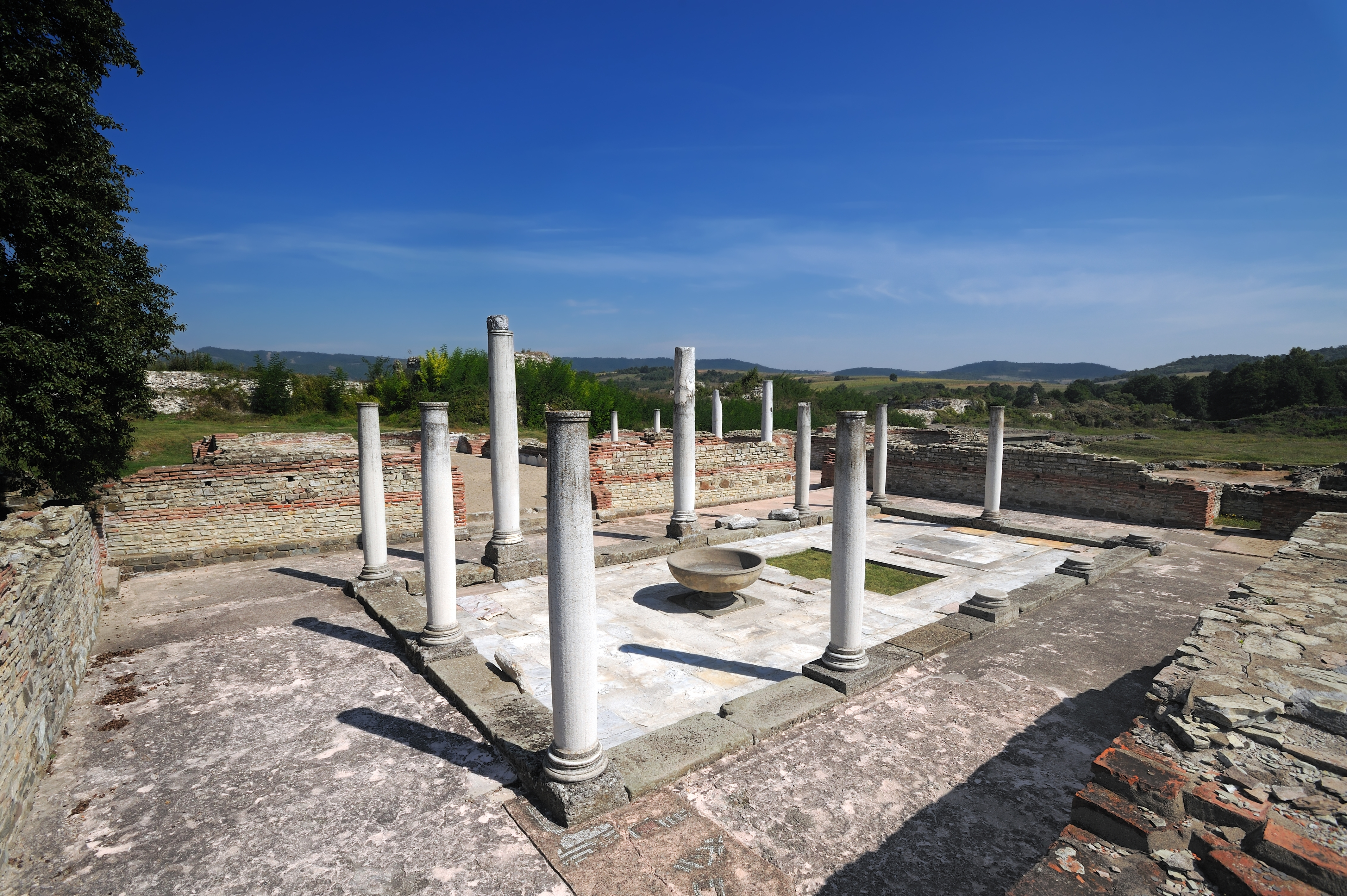 carska palata Felix Romuliana